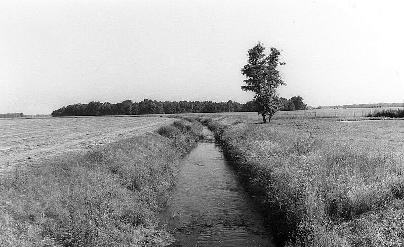 Original image description from the Deutsche FotothekRalbitz-Rosenthal-Naußlitz. Ehem. Jurasmühle, Klosterwasser nördlich der Mühle